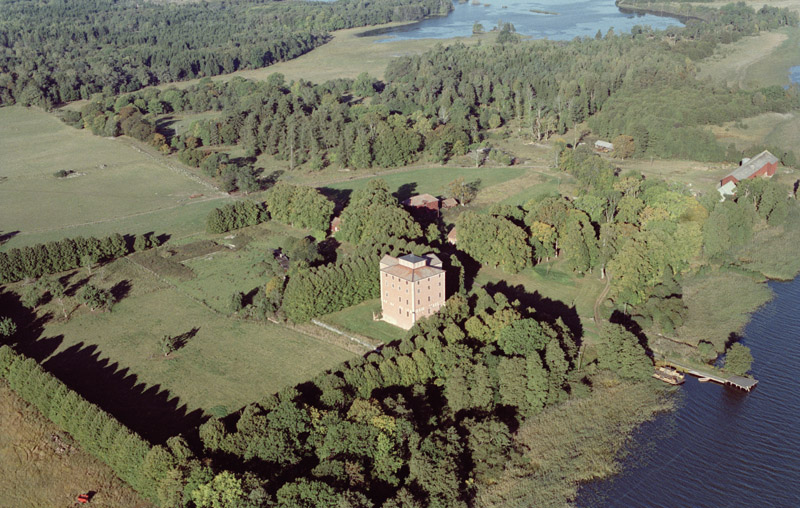 Tynnelsö slott. Bilden är tagen mot (väderstreck): V Motiv: Tynnelsö Nyckelord: Flygbilder, Riksintressen Kategori: Herrgårds-/slottslandskapTynnelsö slott. Bilden är tagen mot (väderstreck): V.